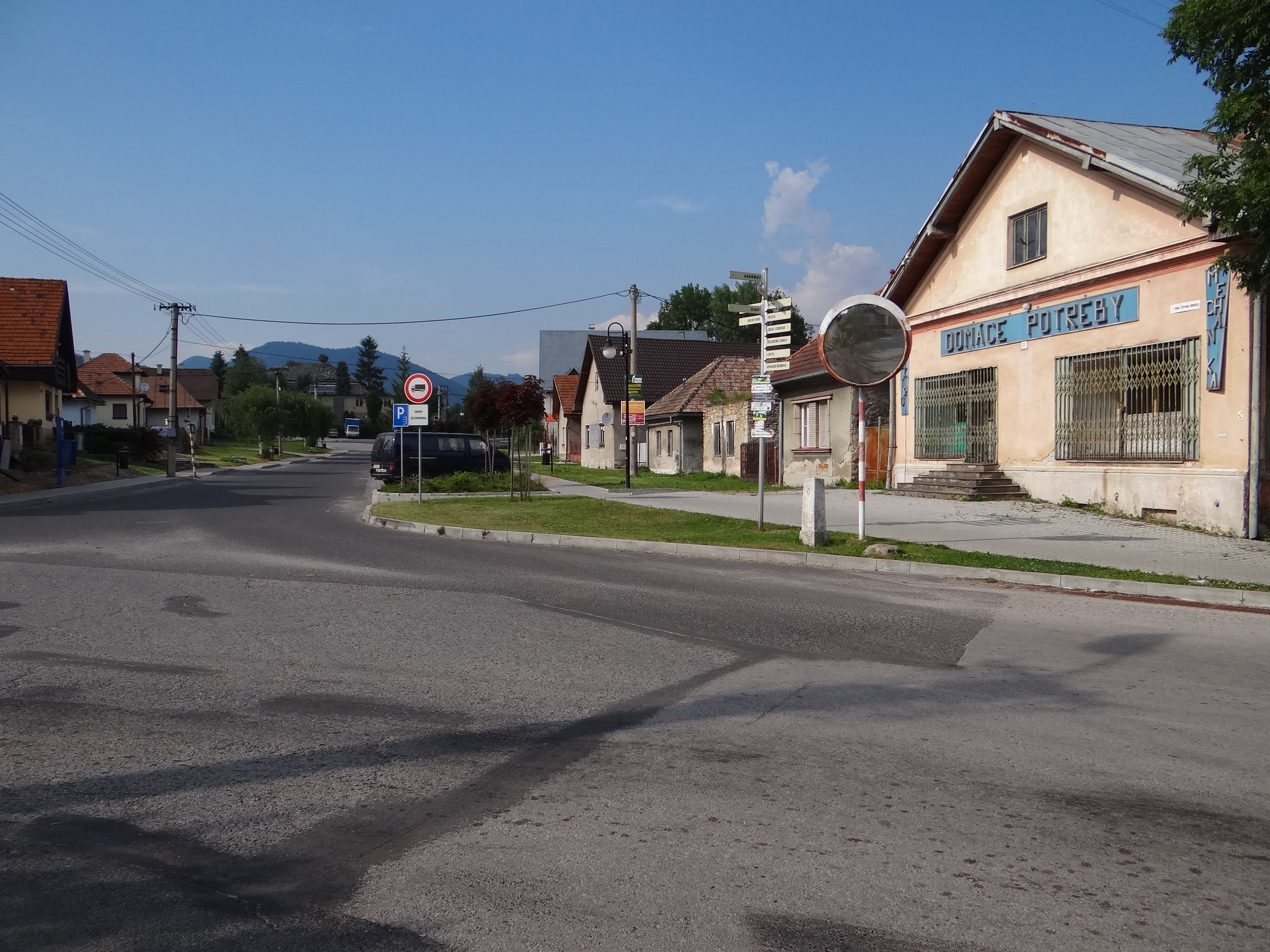 Liptovská Teplá